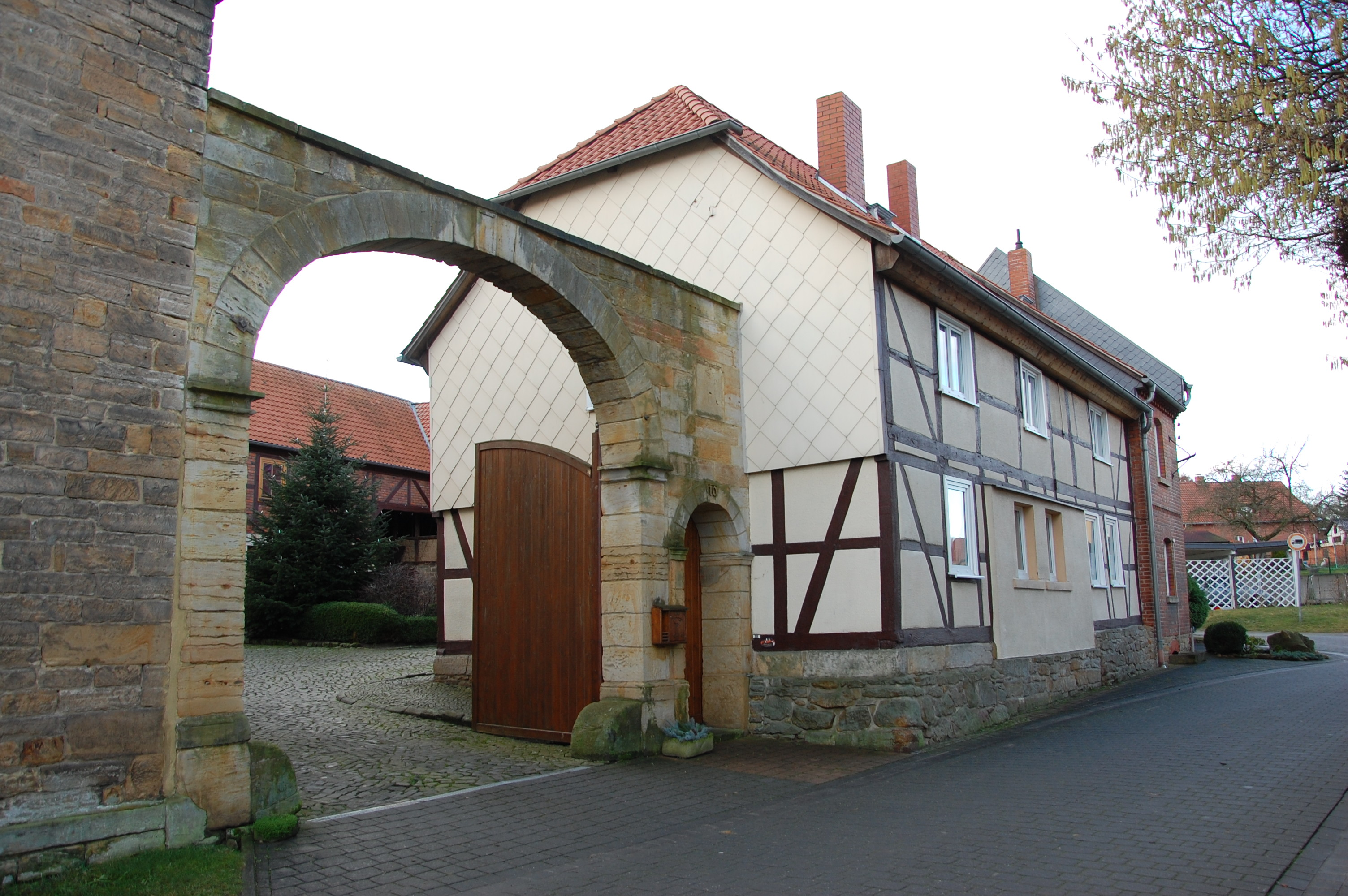 Haus Ackerstraße 10 in Morsleben